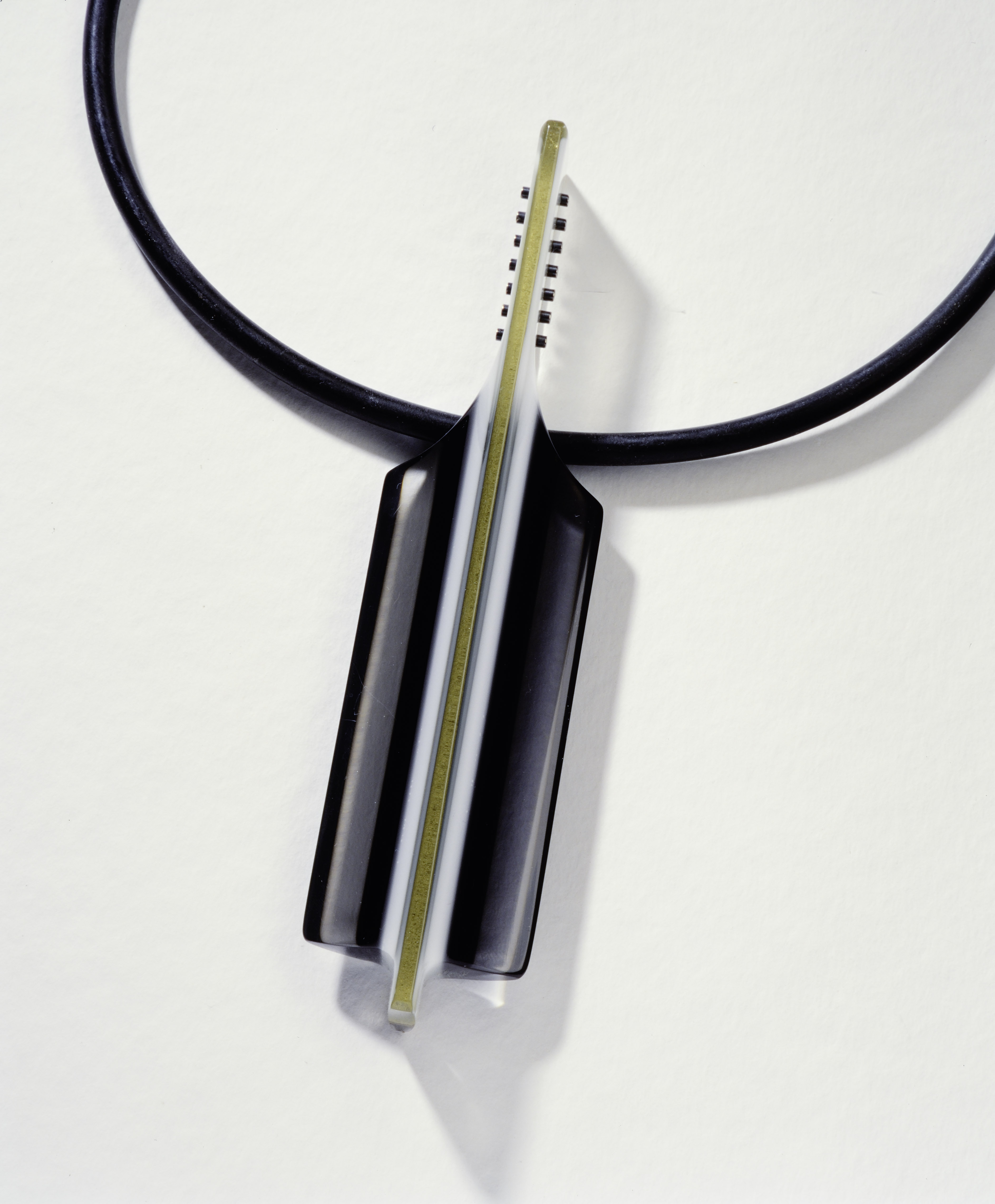 Pendentif réalisé en verre acrylique vers 1985 par le sculpteur et créateur de bijoux contemporains.